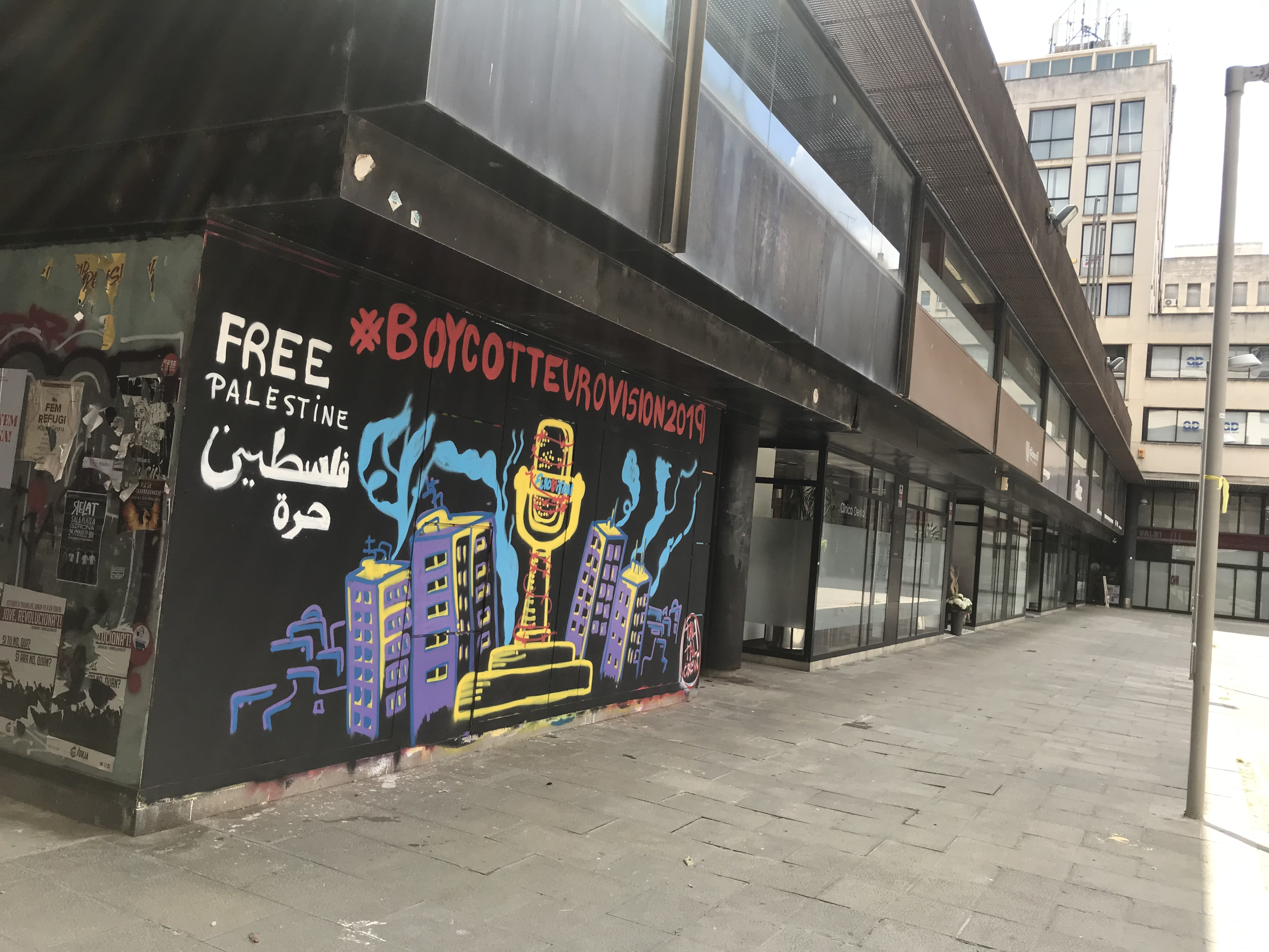 Mural a Girona demanant el boicot al Festival de la Cançó d'Eurovisió 2019